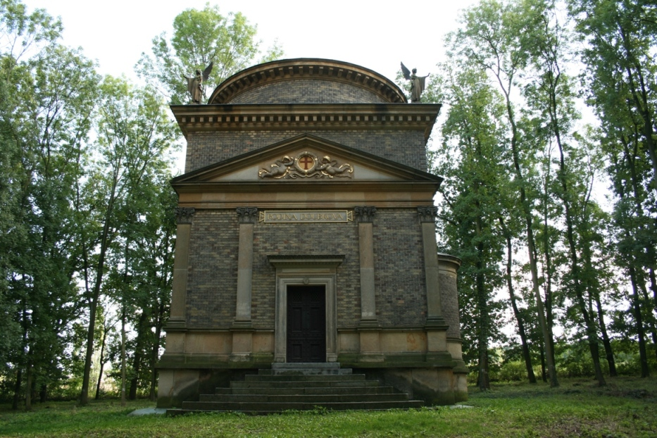 Liteň hrobka Daubků výběr – pohled ze severu na jih na průčelí kaple z přístupové cesty od křižovatky. Tympanon nad vchodem dodává stavbě vzhled panteonu. Na snímku je viditelný nízký tambur s průměrem menším než čtvercový půdorys kaple a sochy stojících andělů s křídly a napřaženou rukou. Hrobka je jedno ze zastavení Naučné stezky Liteň Naučná stezka Liteň nabízí turistům a návštěvníkům procházku nebo projížďku na kole po pozoruhodnostech malebného městyse Liteň v okrese Beroun. Klíčová slova: Berounsko - hrobka - kaple - Karlštejnsko – Liteň – naučná stezka – památky - Antonín Wiehl